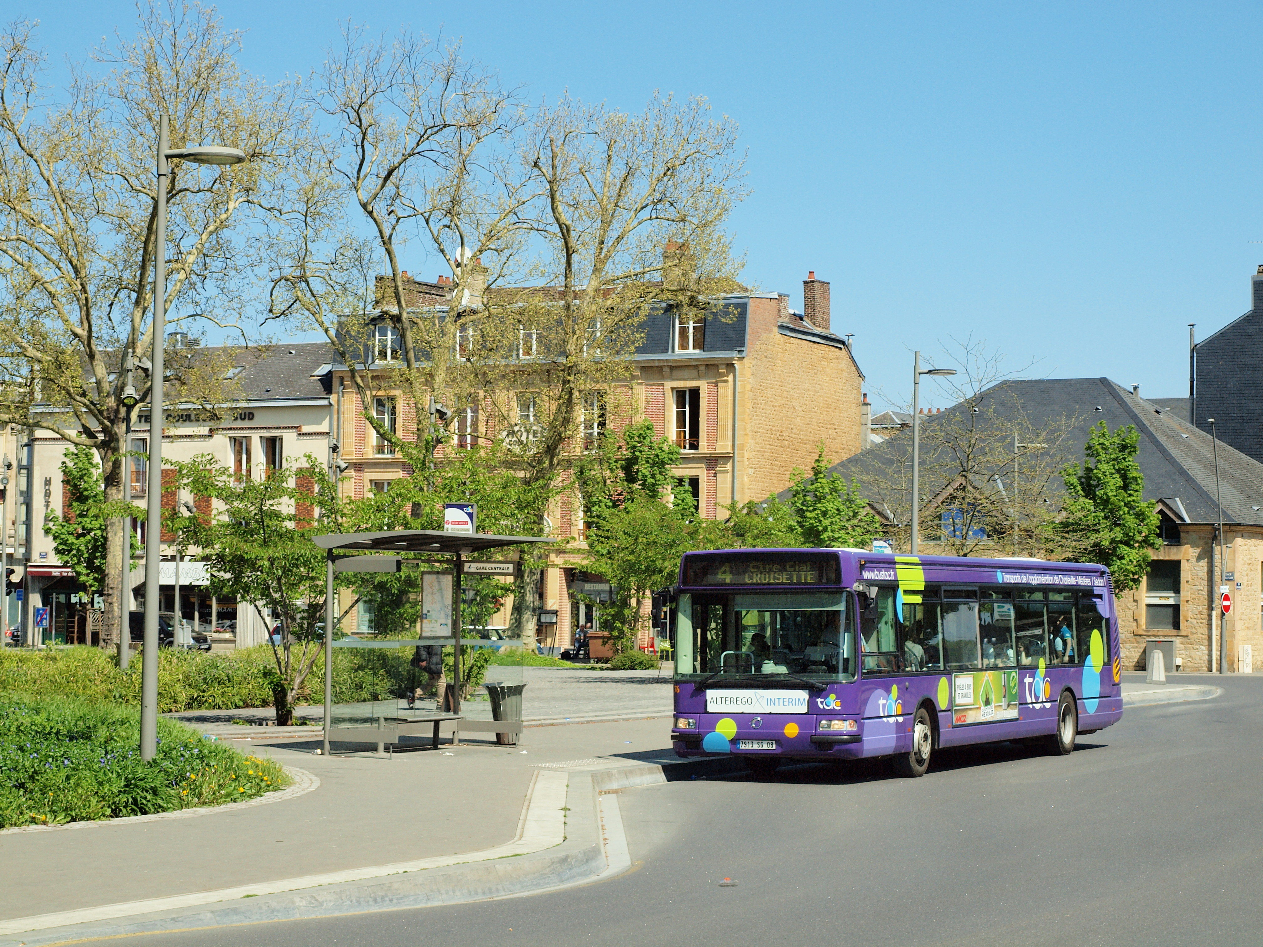 abribus & bus à la gare de Charleville-Mézières (Ardennes, France)